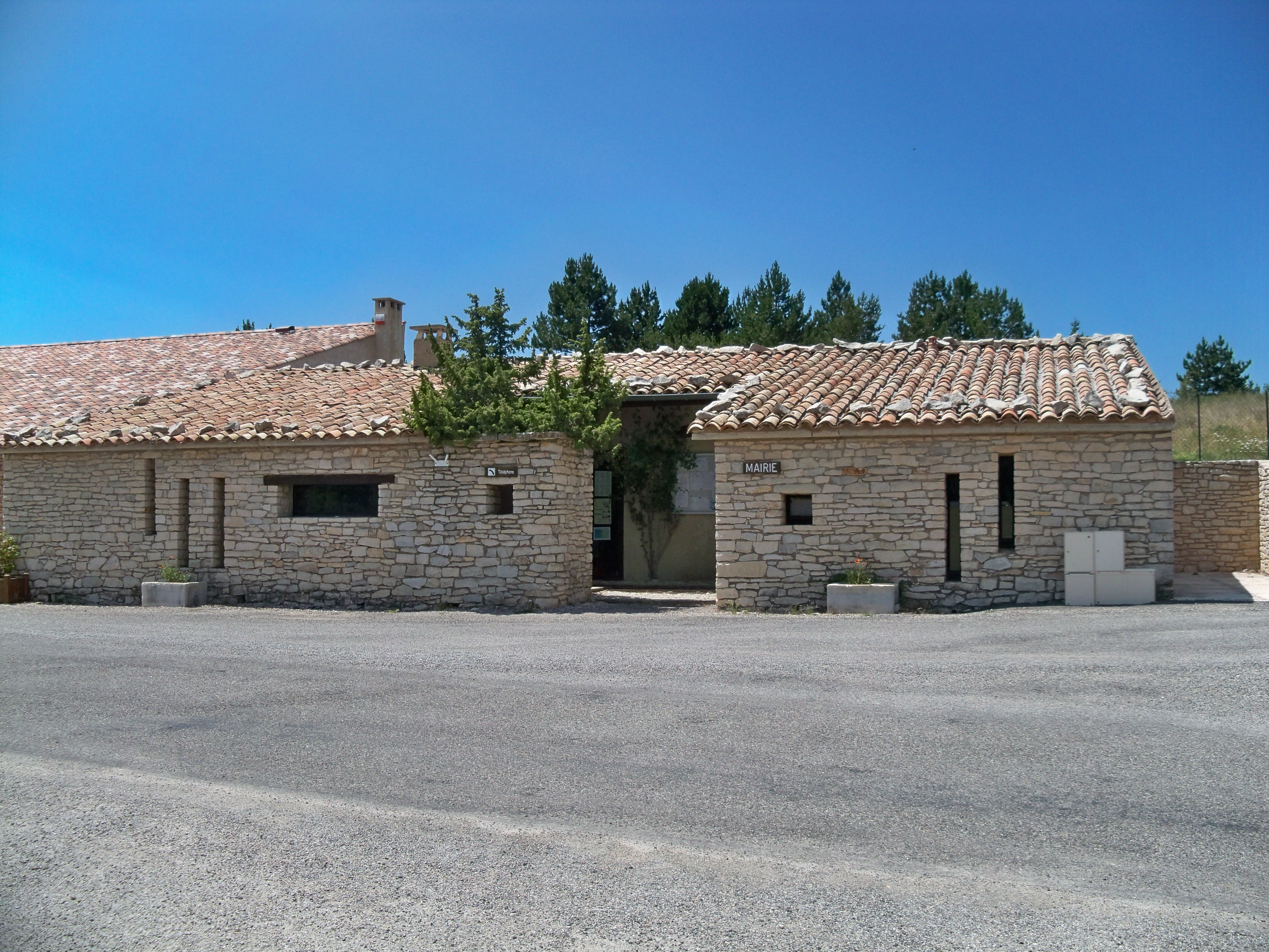 Mairie de Redortiers (04)